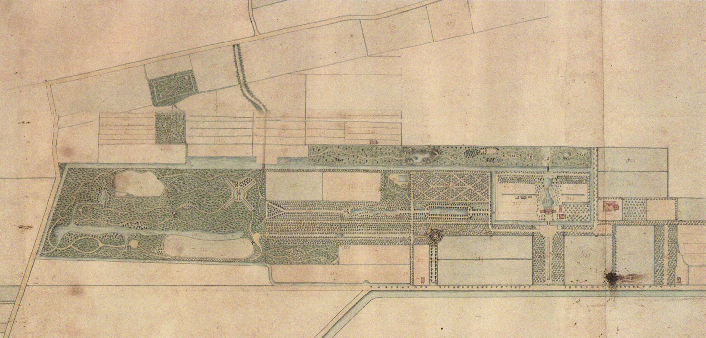 Plattegrond van de buitenplaats Veenhuizen nabij Noordbroek